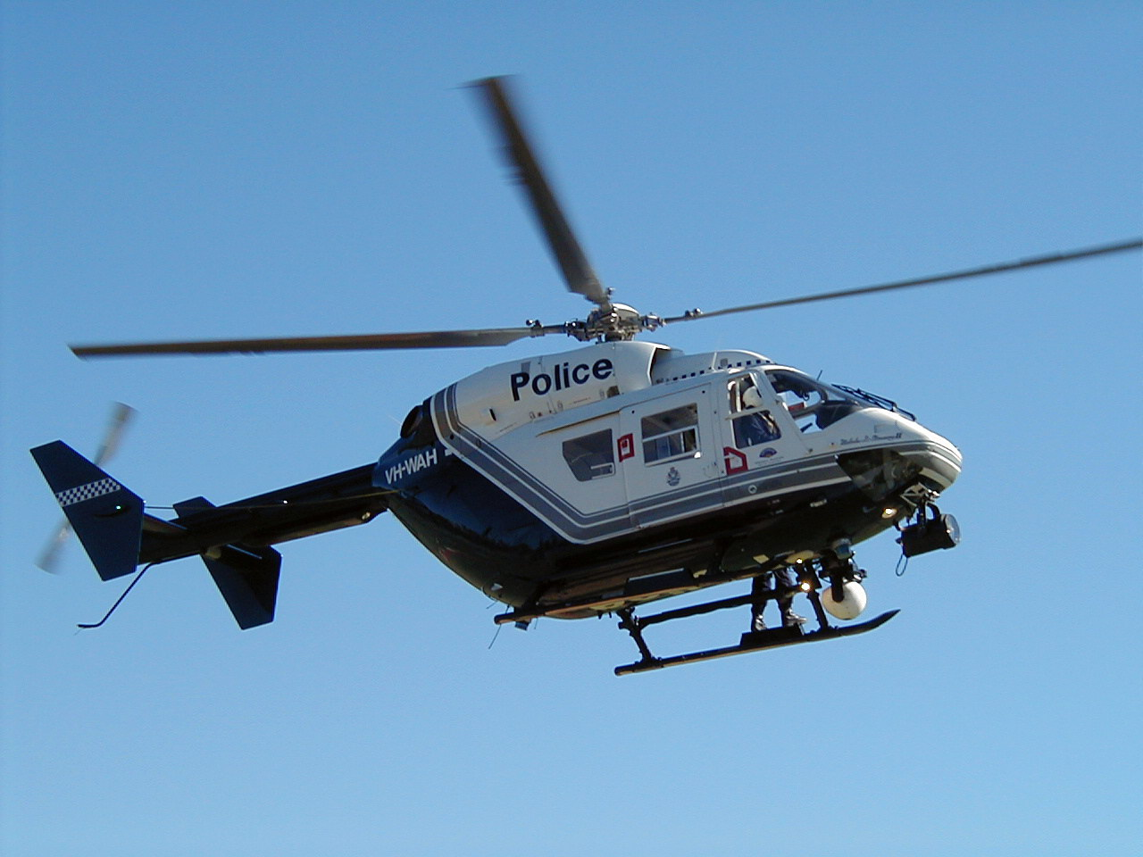 Kawasaki BK117 - WA Police Polair 61 helicopter.